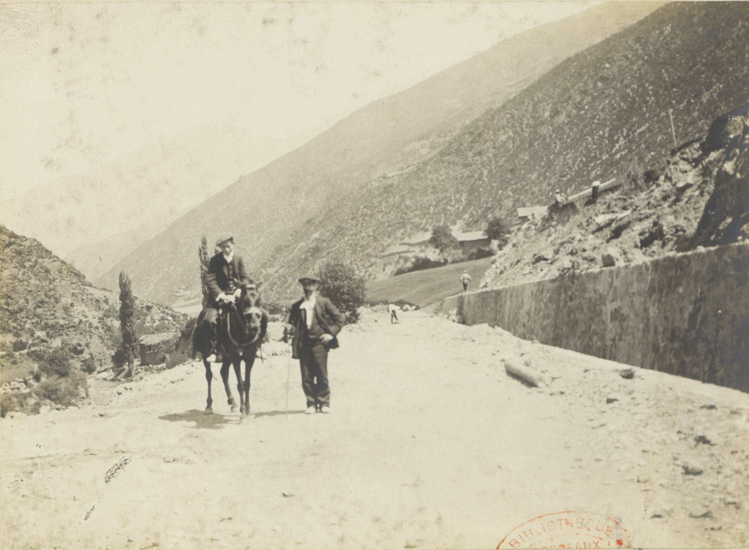 La Farga de Moles; Nouvelle route d'Andorre